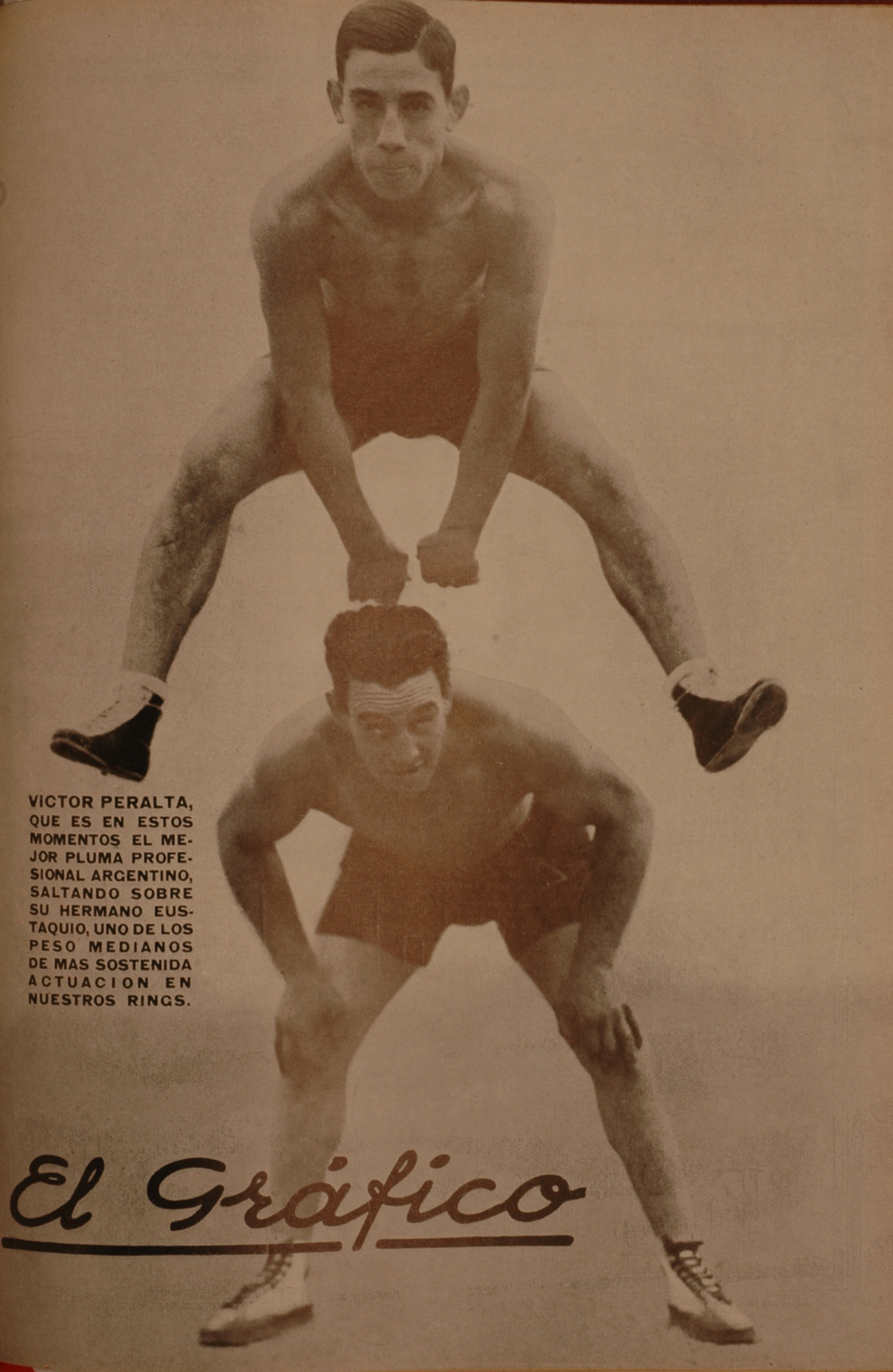 El Grafico del 11 de Enero de 1930. Edicion 548